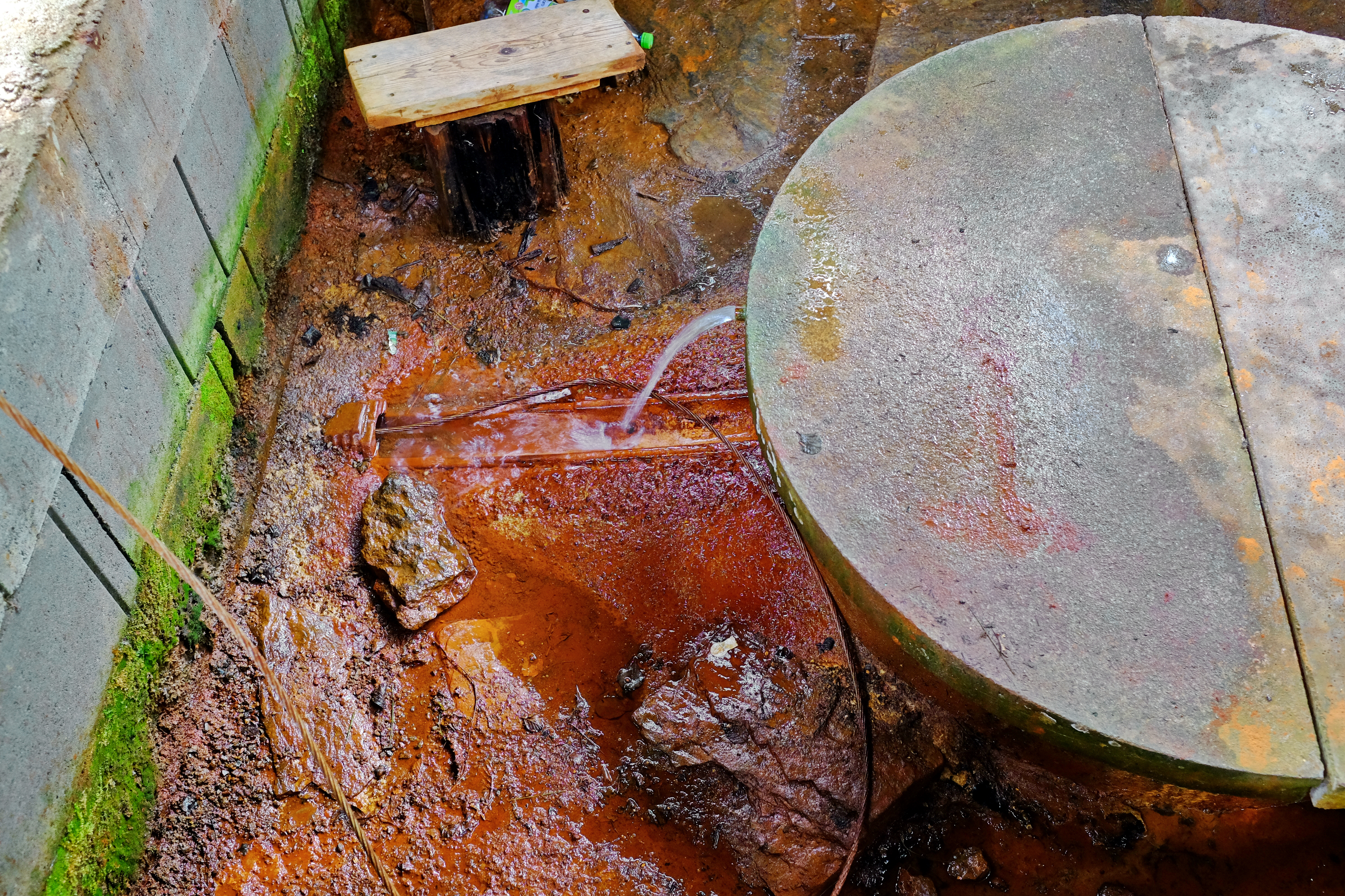 Jedlovská kyselka, Jedlová, osada obce Stará Voda, okres Cheb